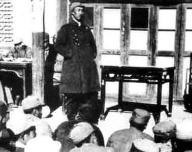 1937年，徐向前向八路军第129师干部作报告